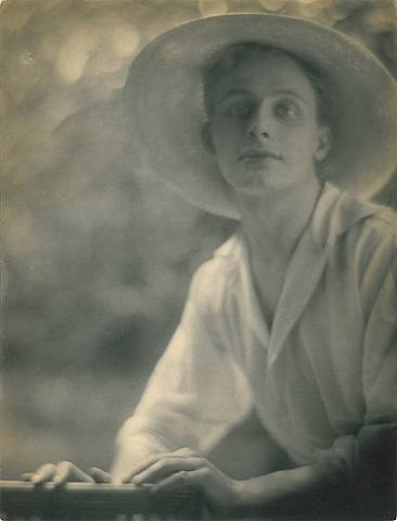 Photographie de William Ranken (1881-1941) en 1902.